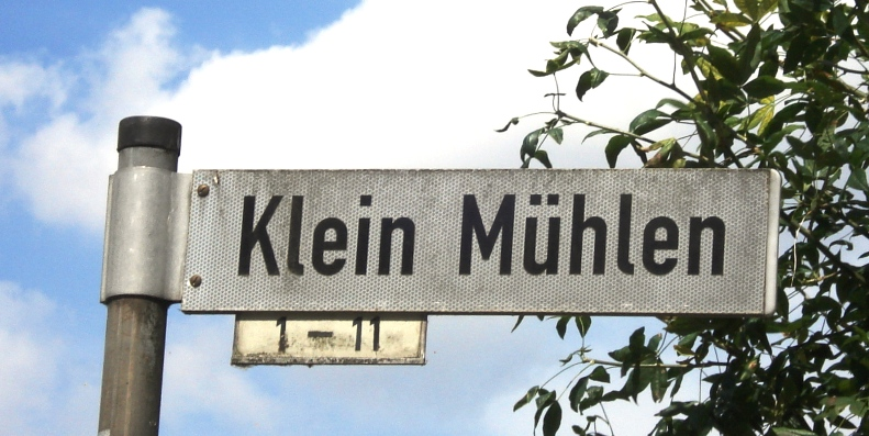 Das Straßenschild Klein Muehlen in Bad Schwartau